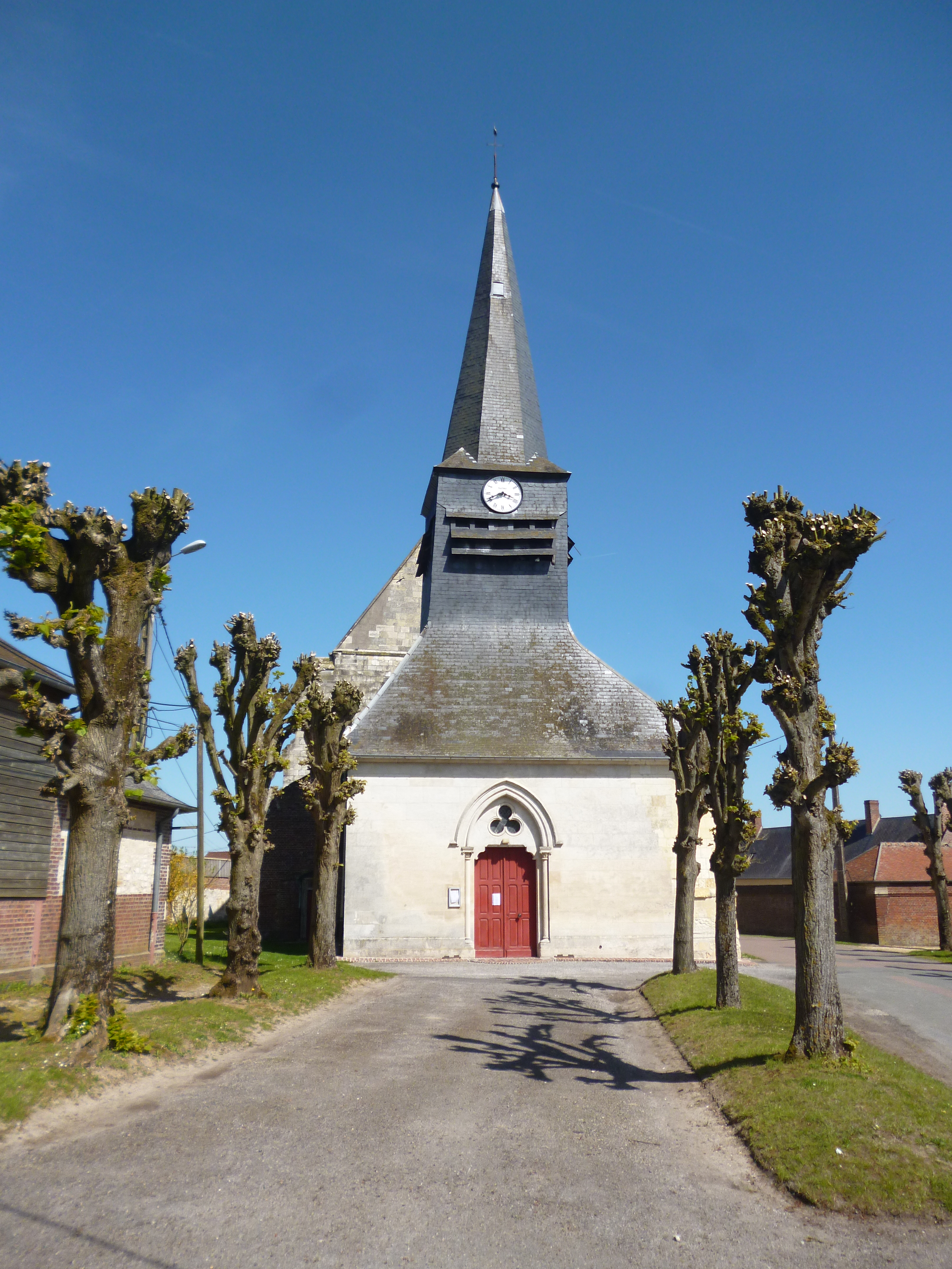 Eglise Notre-Dame de Ferrières (Oise).